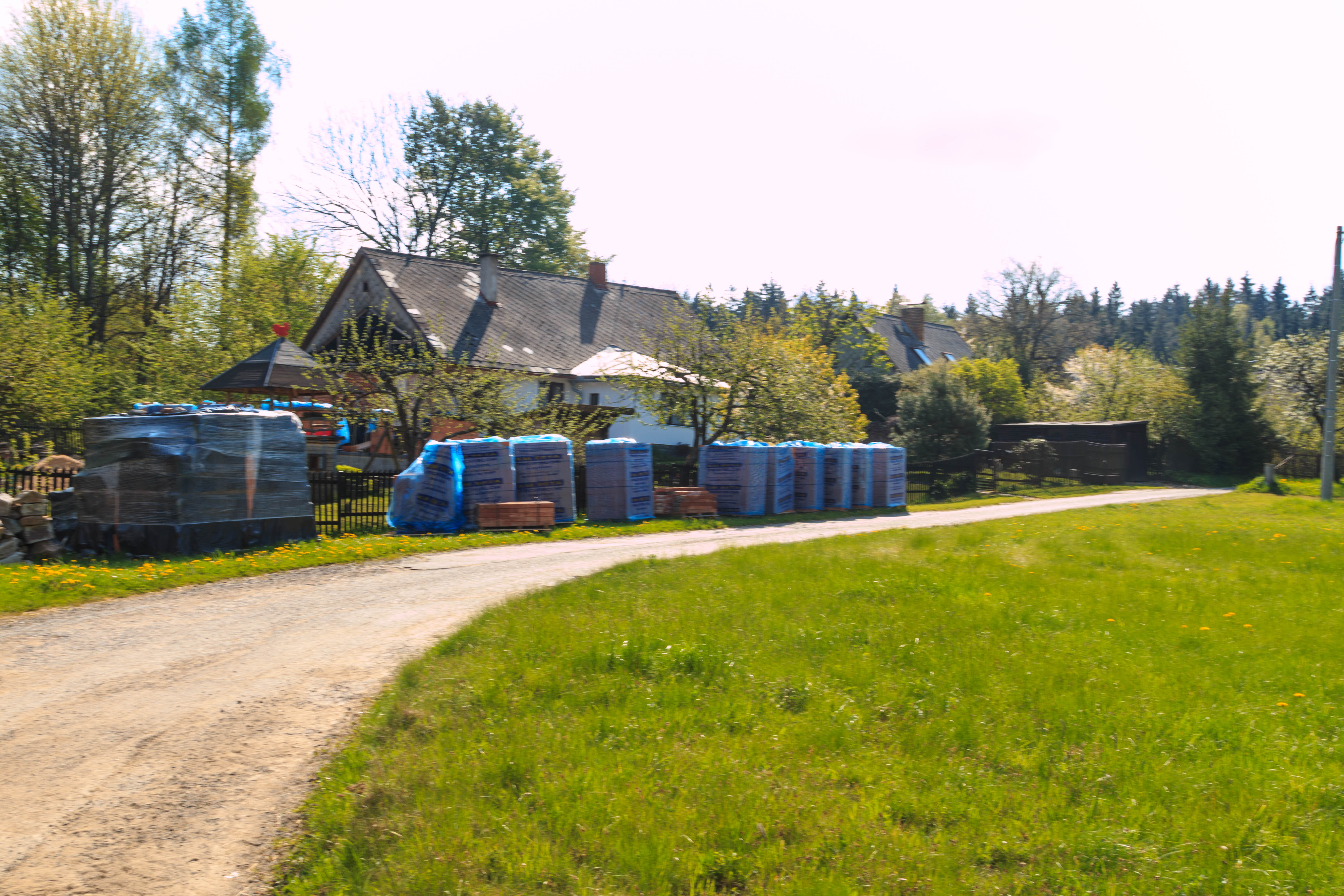 Ruda čp. 11